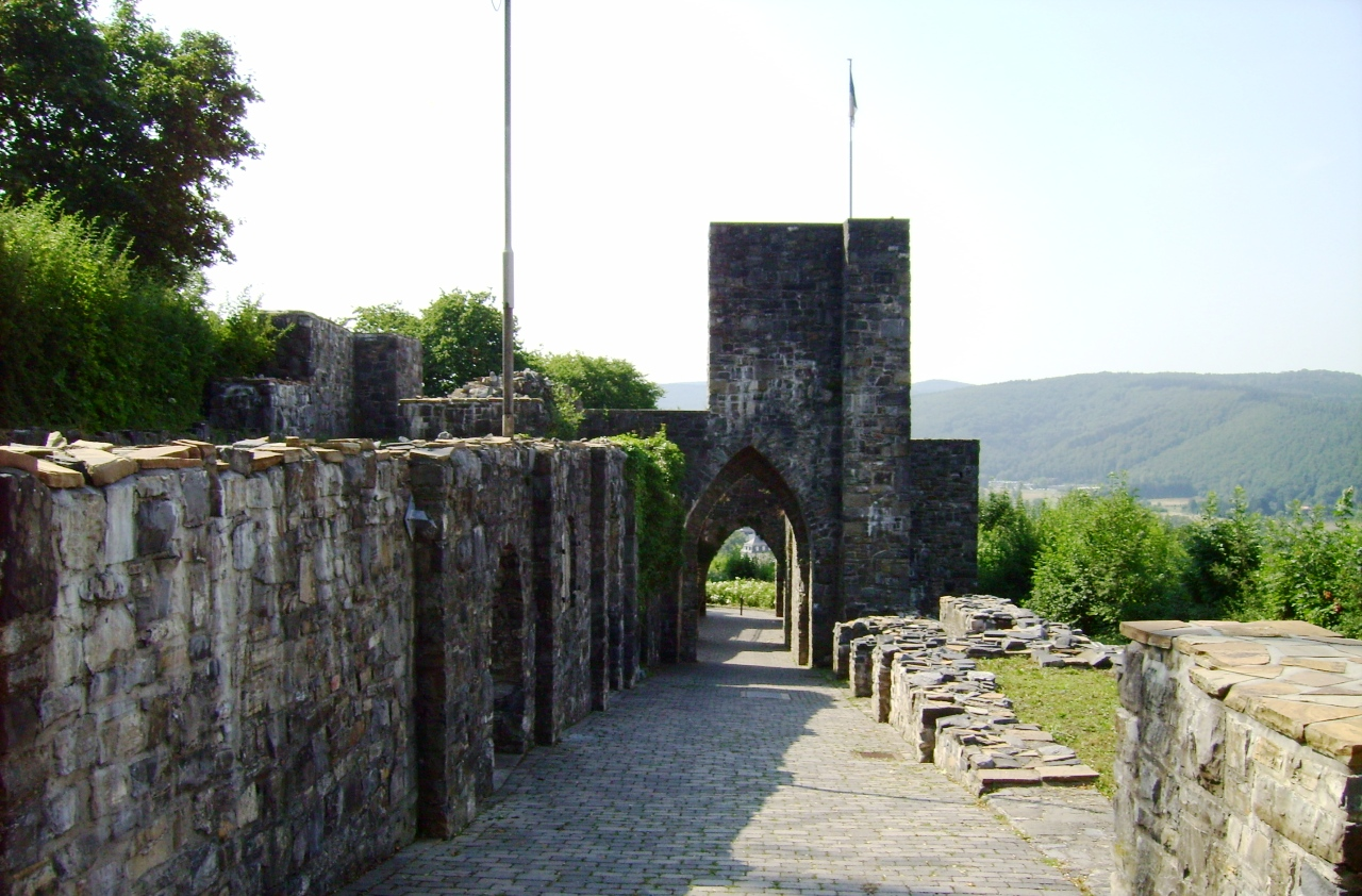 Ruine Schloss Arnsberg